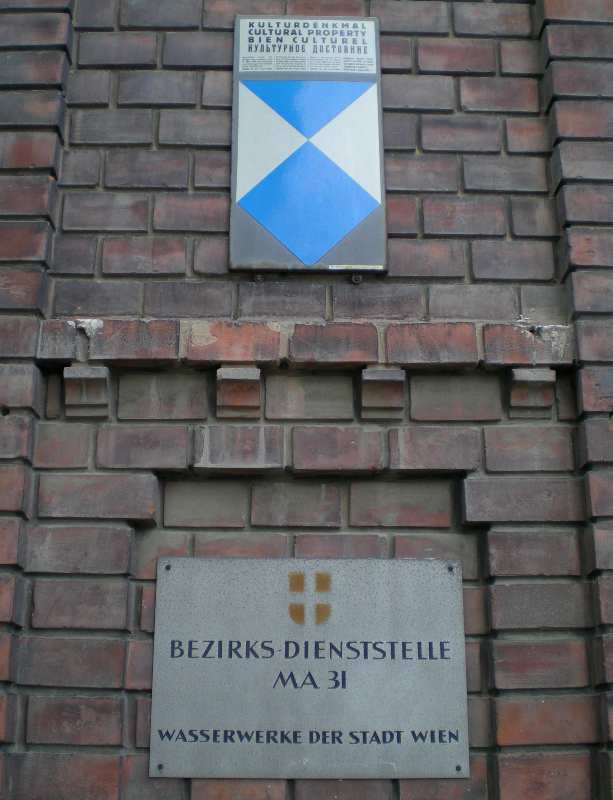 Das ehemalige Pumpwerk Breitensee der Wiener Wasserwerke in Wien-Penzing (Hütteldorfer Straße 142)